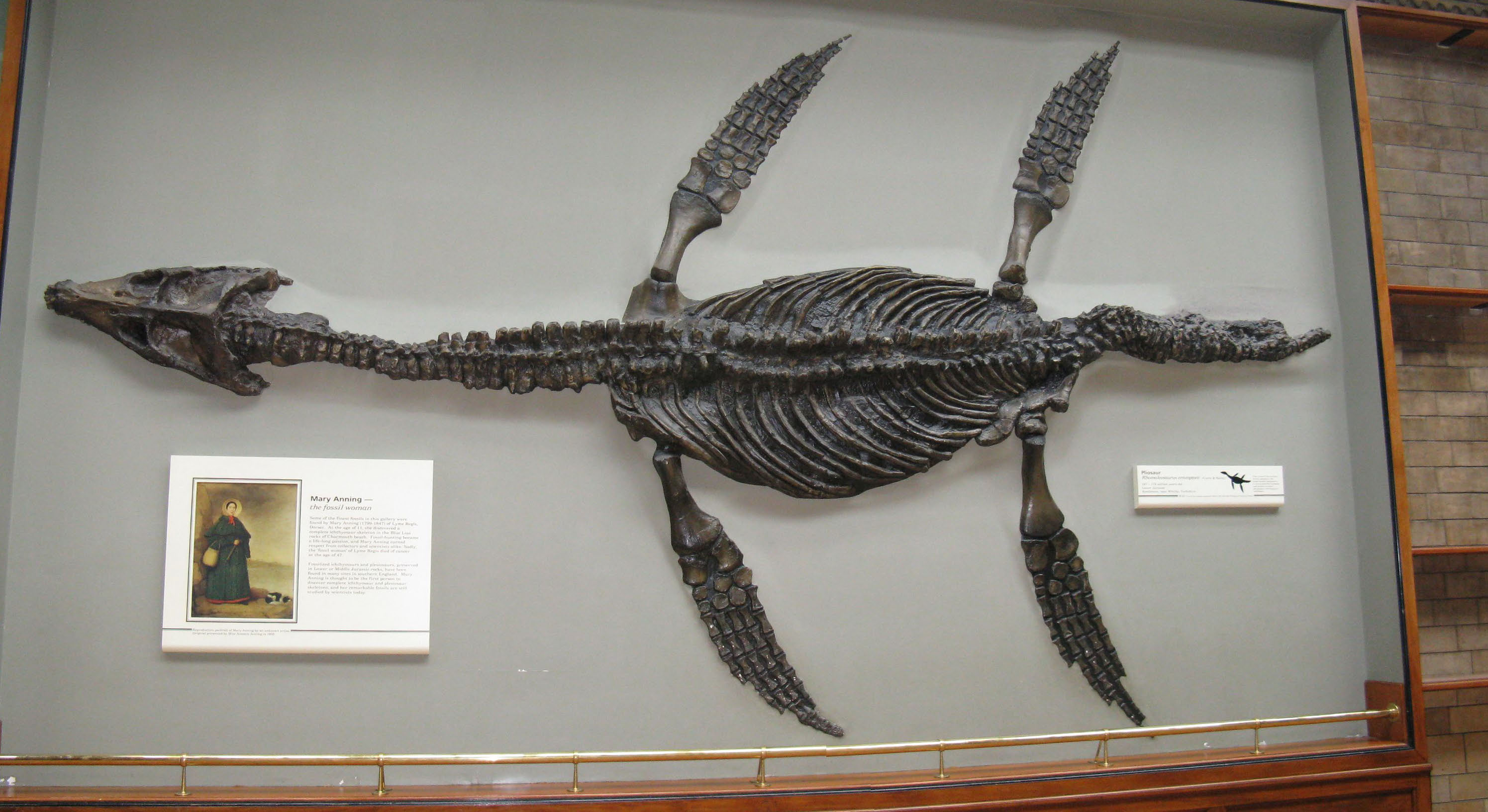 Pliosaur